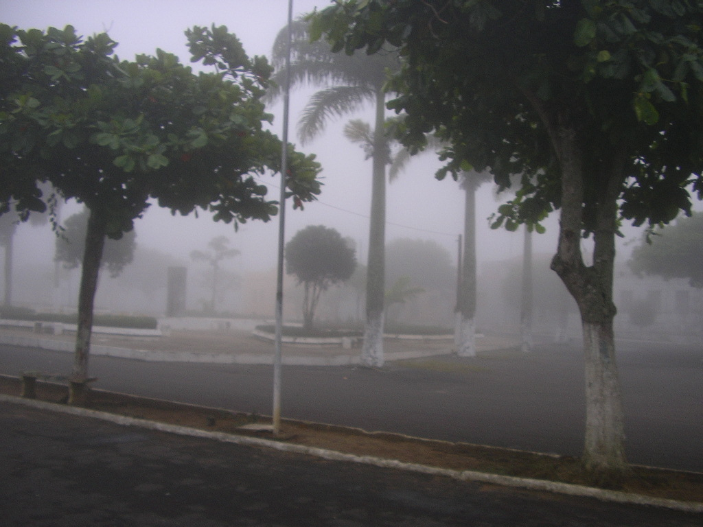 Imagem dsa cidade de Ibiapina no interior do Ceará às 7 horas da manhã.